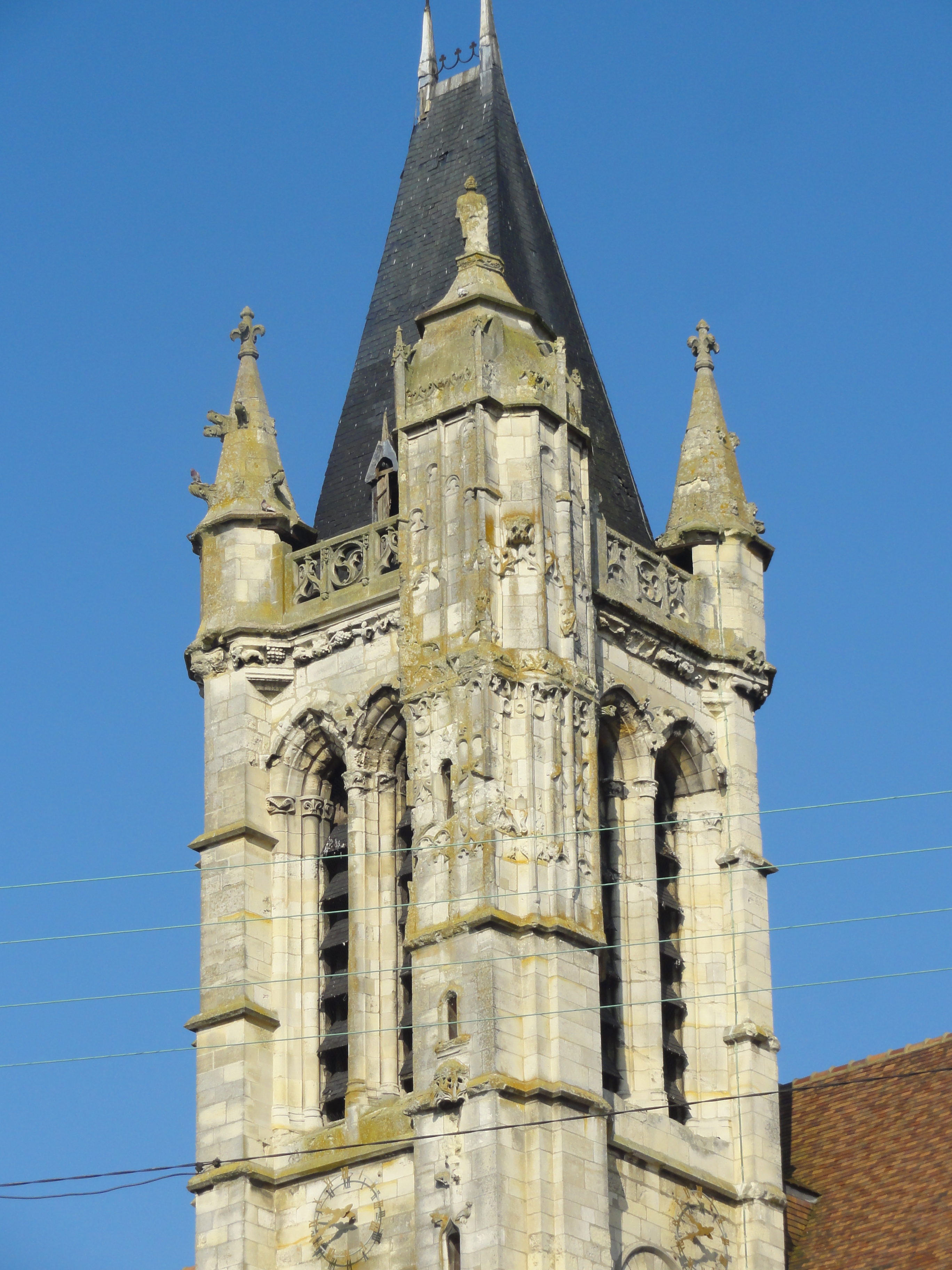 Voir titre.